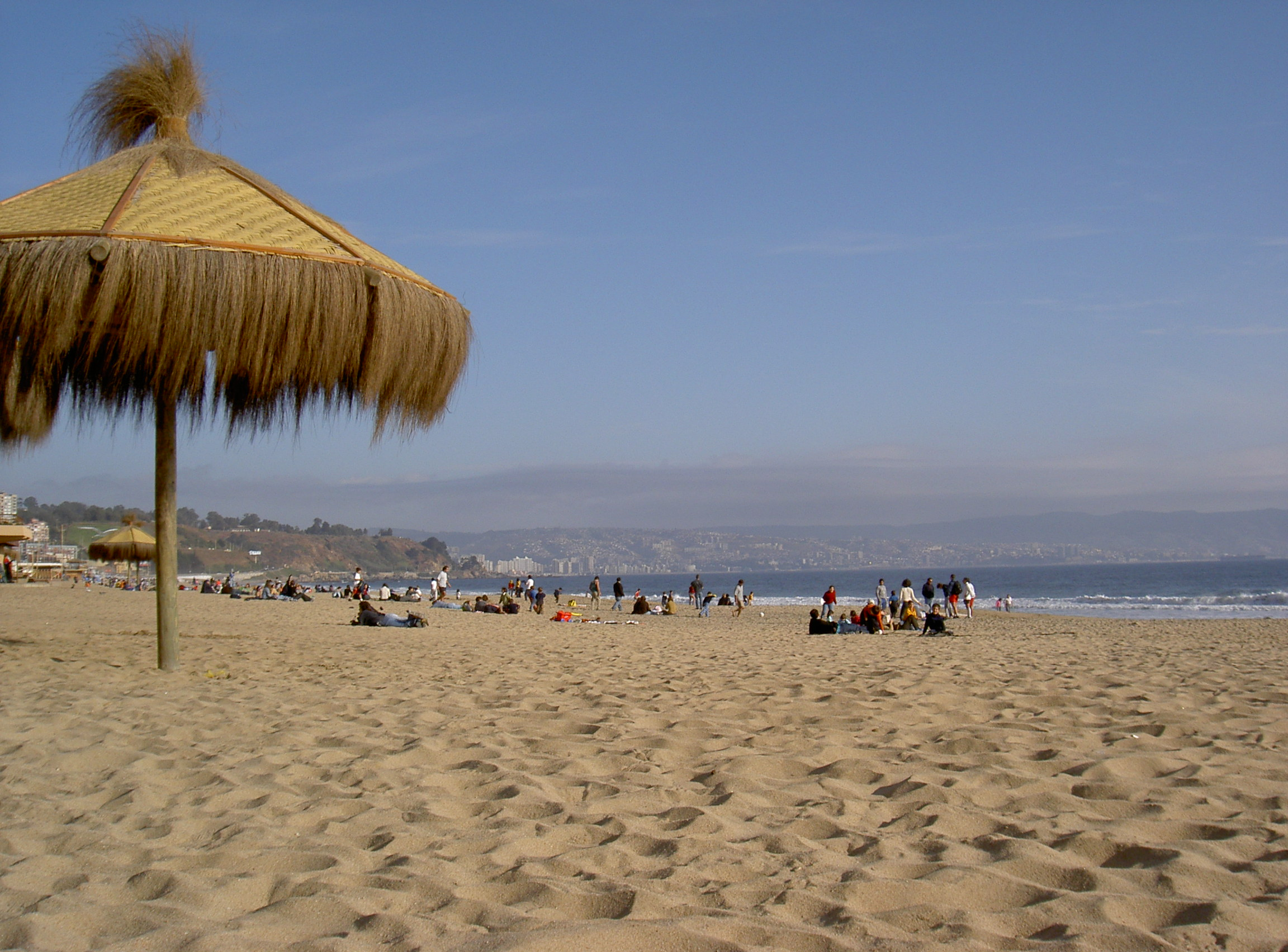 Strand bei Viña del Mar